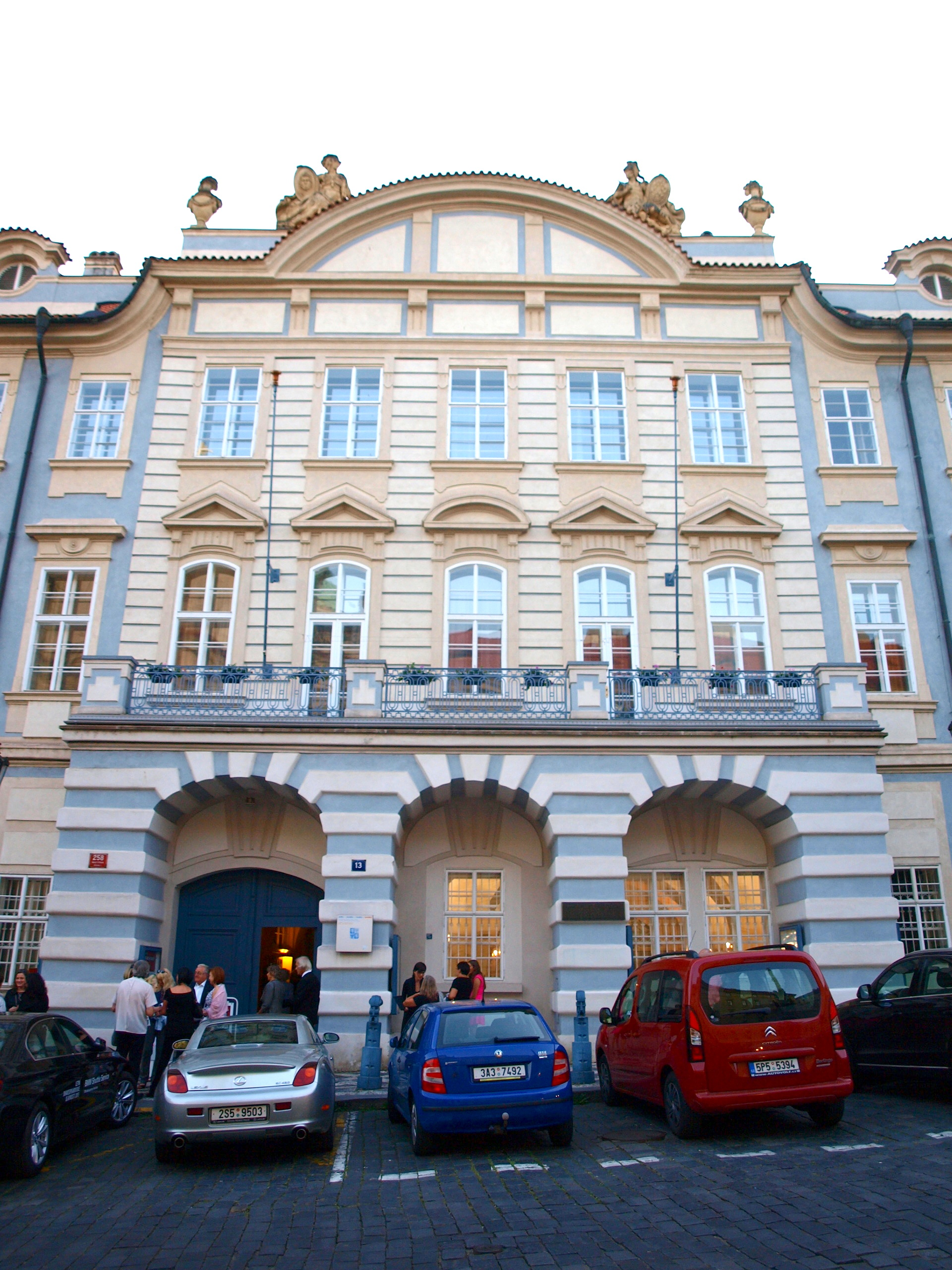 Lichtenštejnský palác na Malostranském náměstí